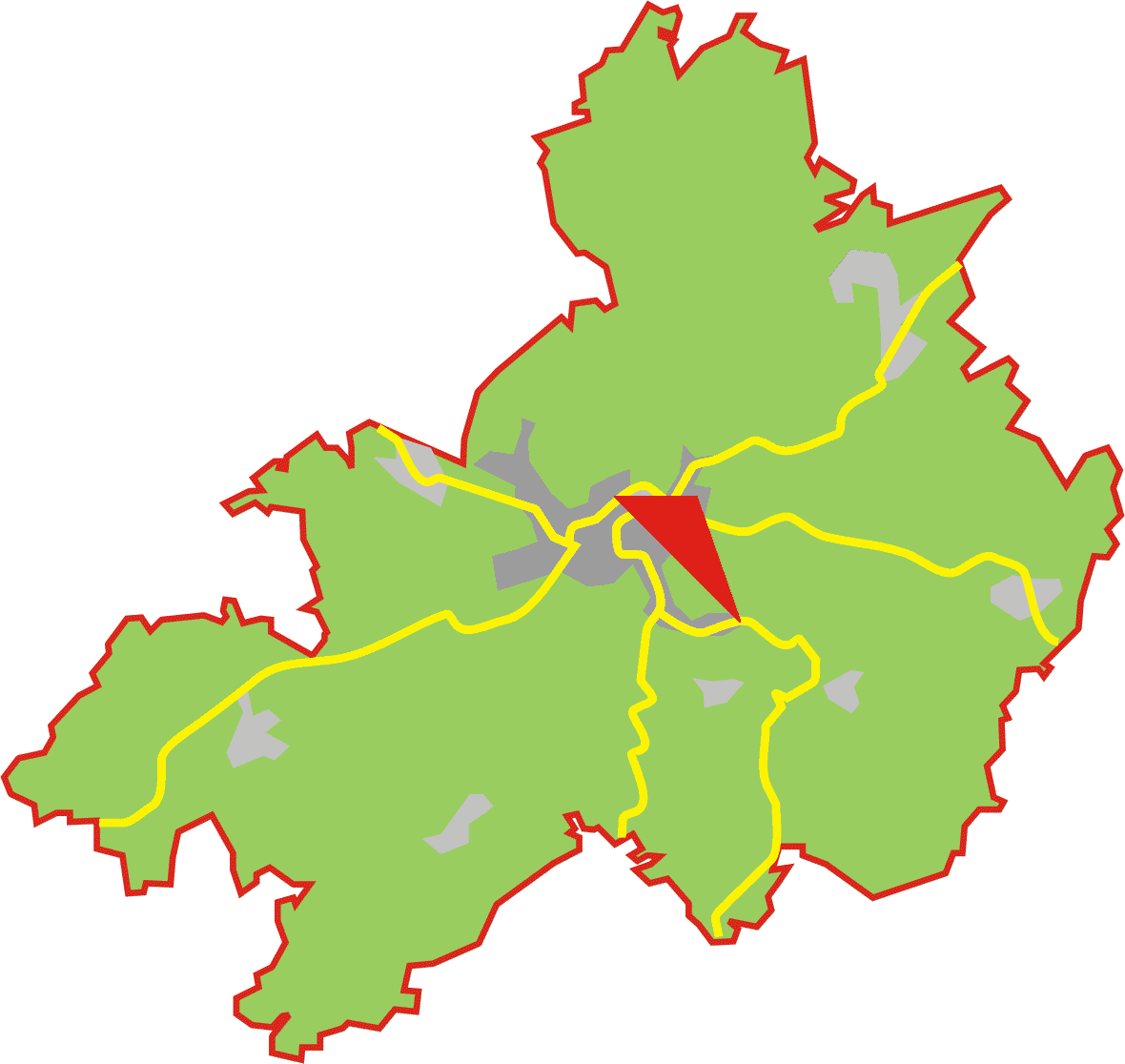 Pos jaegerhof